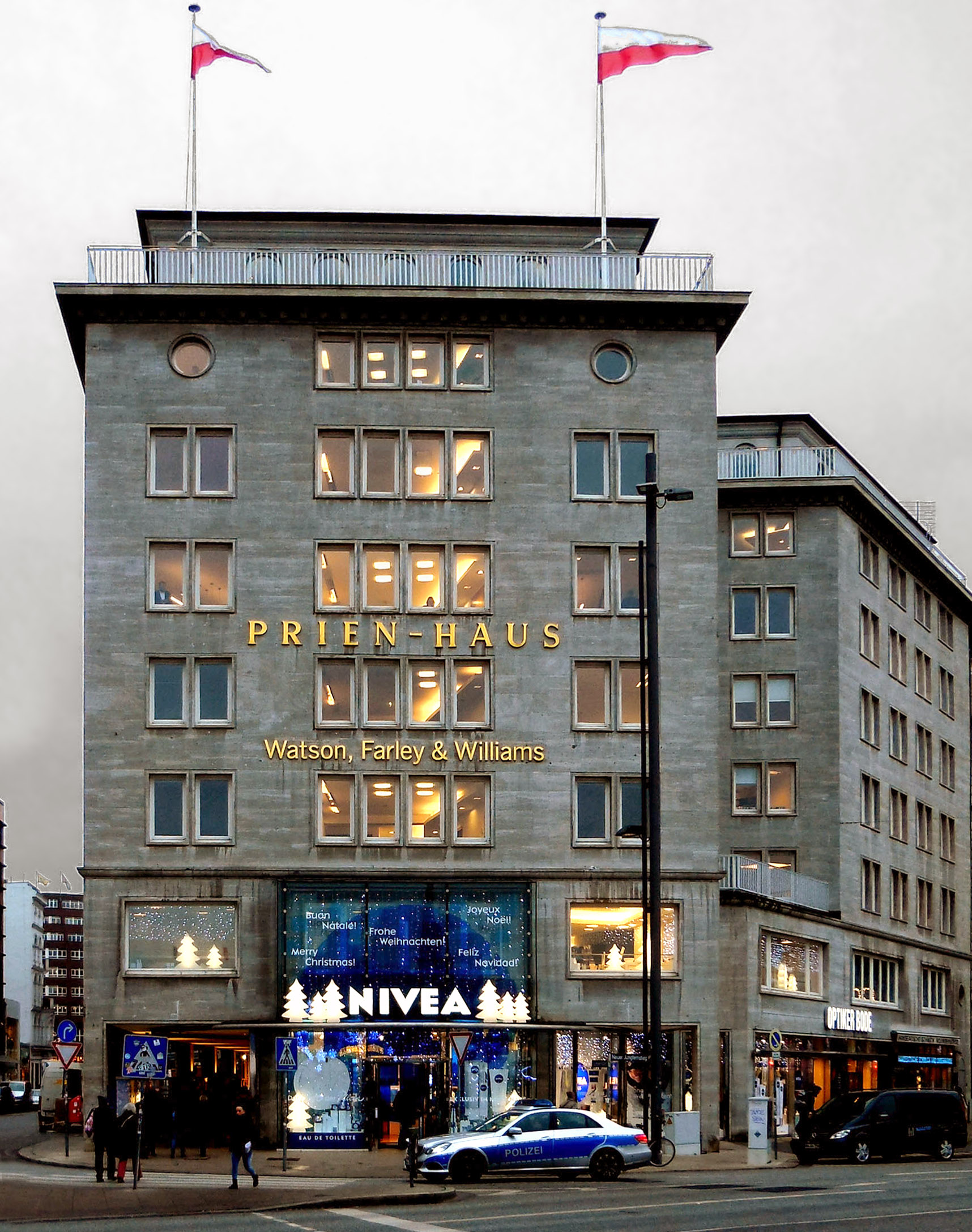 Prien-Haus, 2016, Germany, Hamburg, Jungfernstieg 51